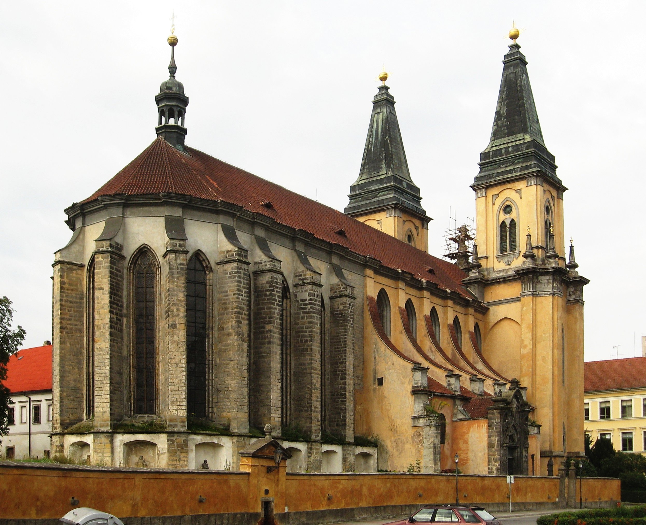 Kostel Narození Panny Marie v Roudnici nad Labem